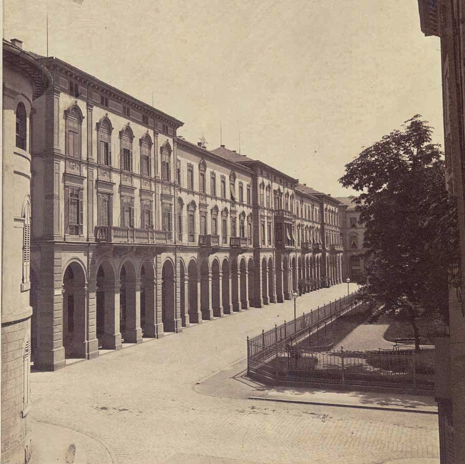 Die Wohngebäude des Friedrichsplatzes zu Carlsruhe. Albuminabzug, 1868. 18,5 x 15,5 cm. Mit Widmung "Seiner lieben Nichte Hermine von Ihrem Onkel Berckmüller dem Erbauer dieser Wohnhäuser. August 1868"